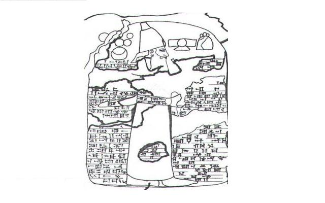 نقش برجسته گل گل